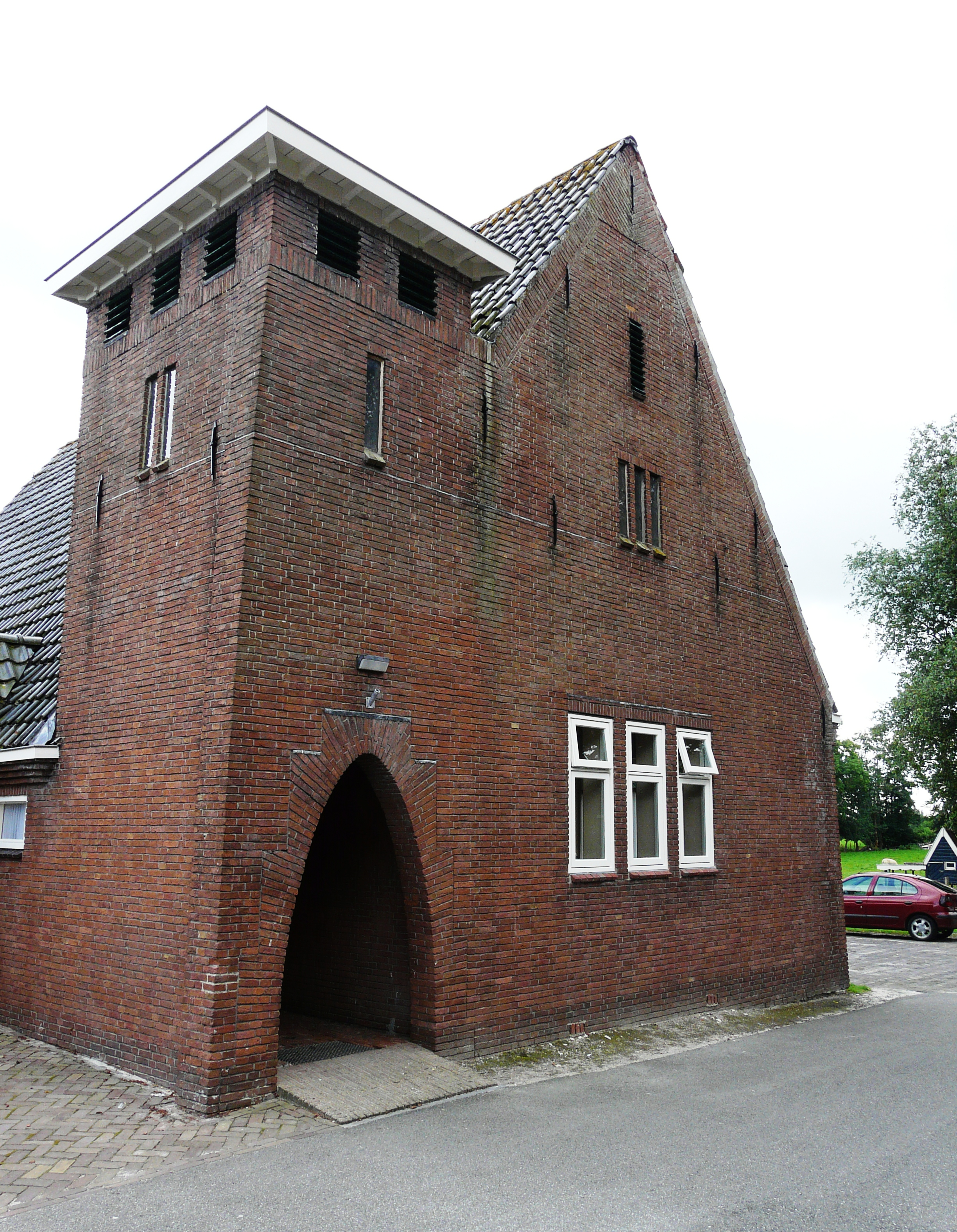 Konsistoarje Surhuzum yn styl Amsterdamske Skoalle.